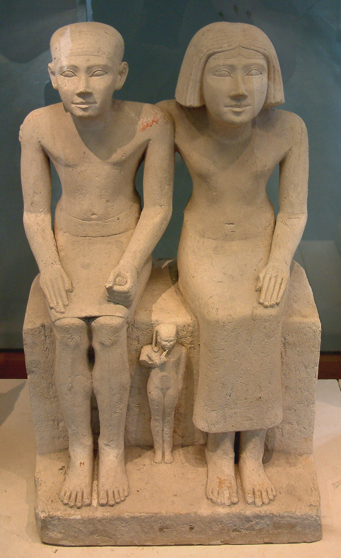 Deux époux et leur fils, IVe dynastie.